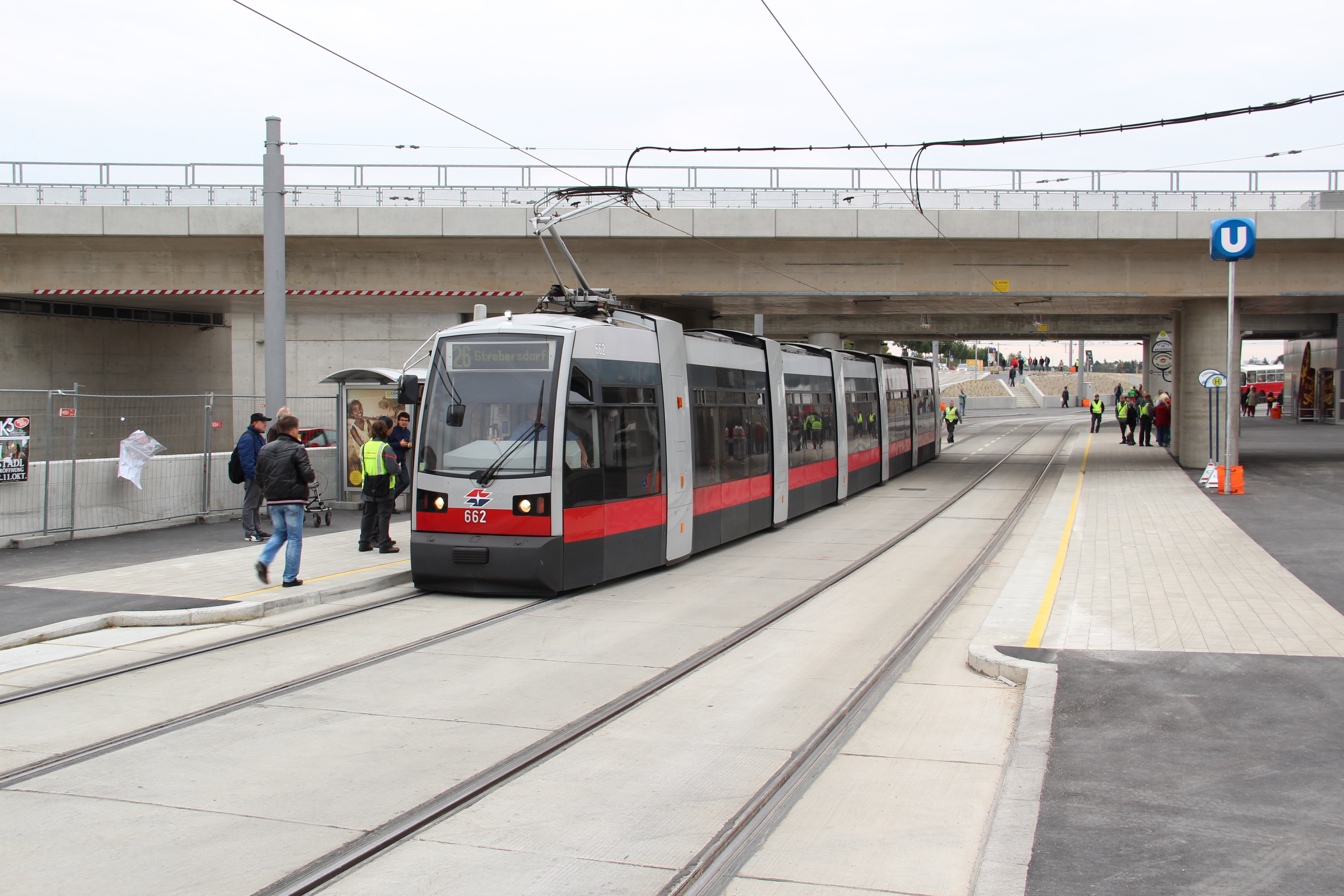 Die Anfangsstation der Linie 26, Hausfeldstraße.